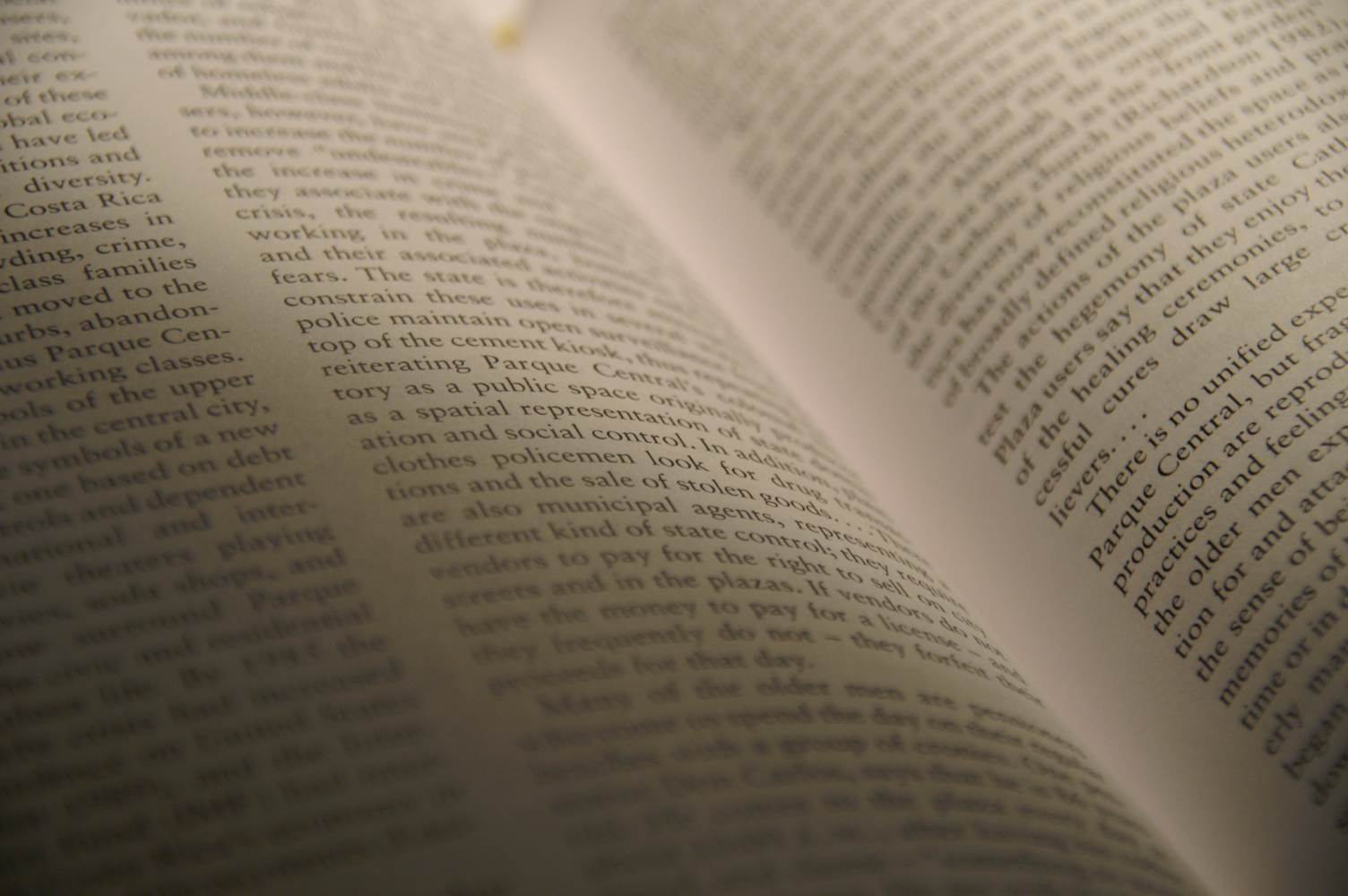 text, pages, open book